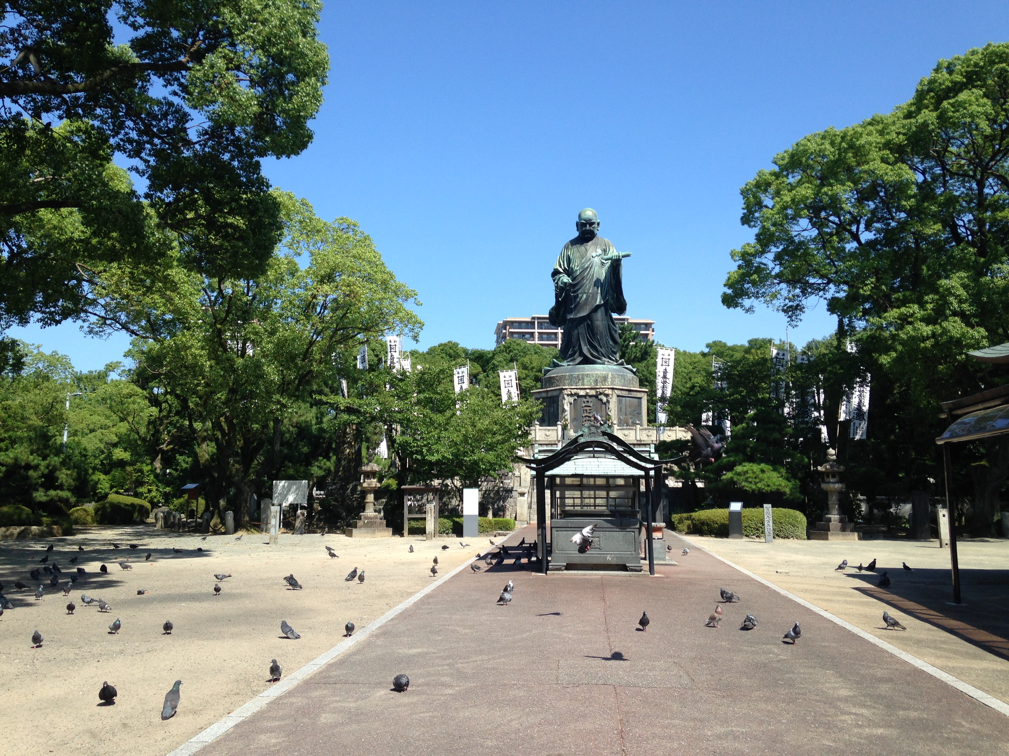 福岡市東公園の日蓮上人像